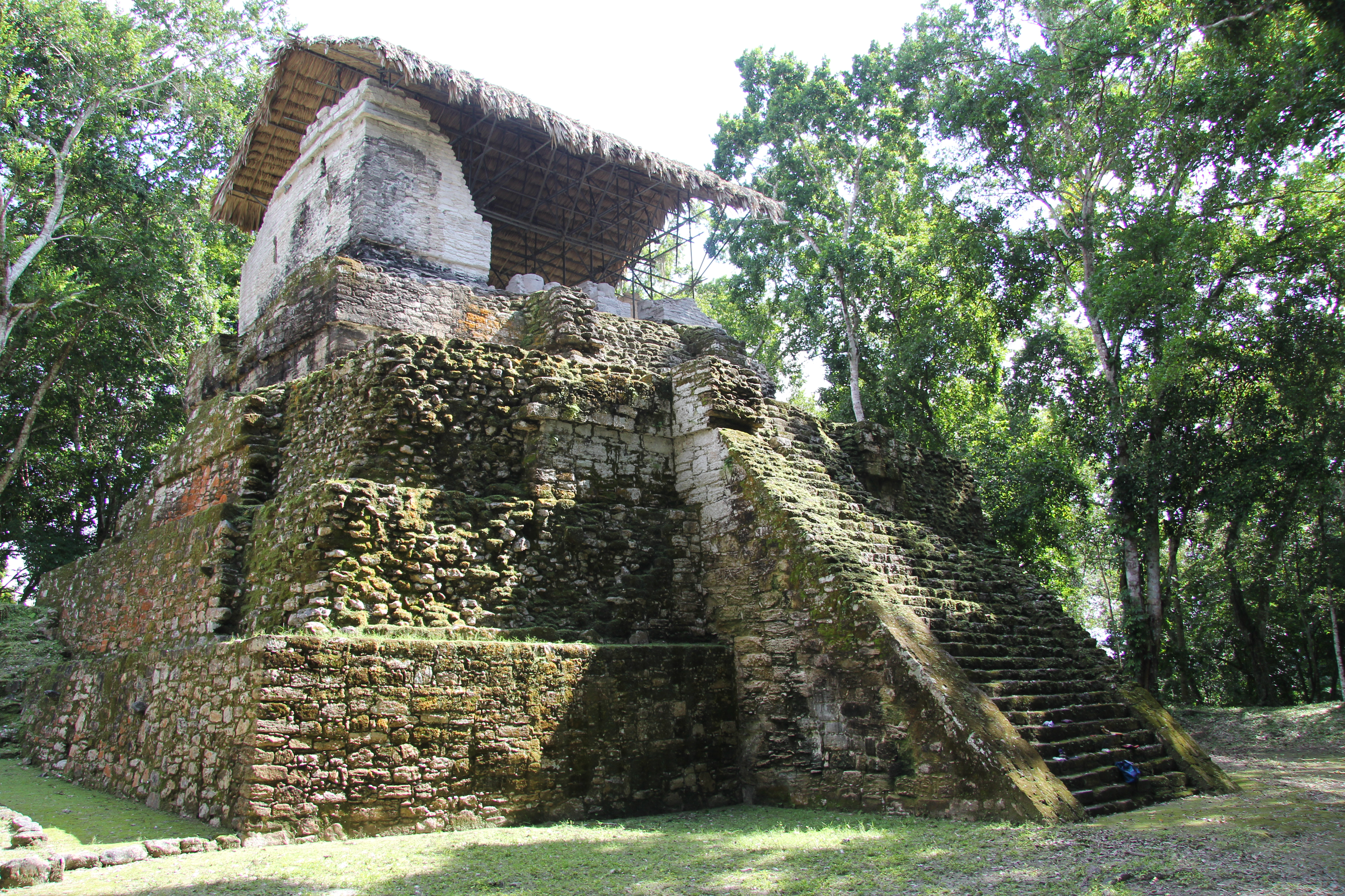 Ruinas mayas en la isla Topoxté, Parque Yaxhá Nakum Naranjo, Reserva de la Biosfera Maya, Petén, Guatemala